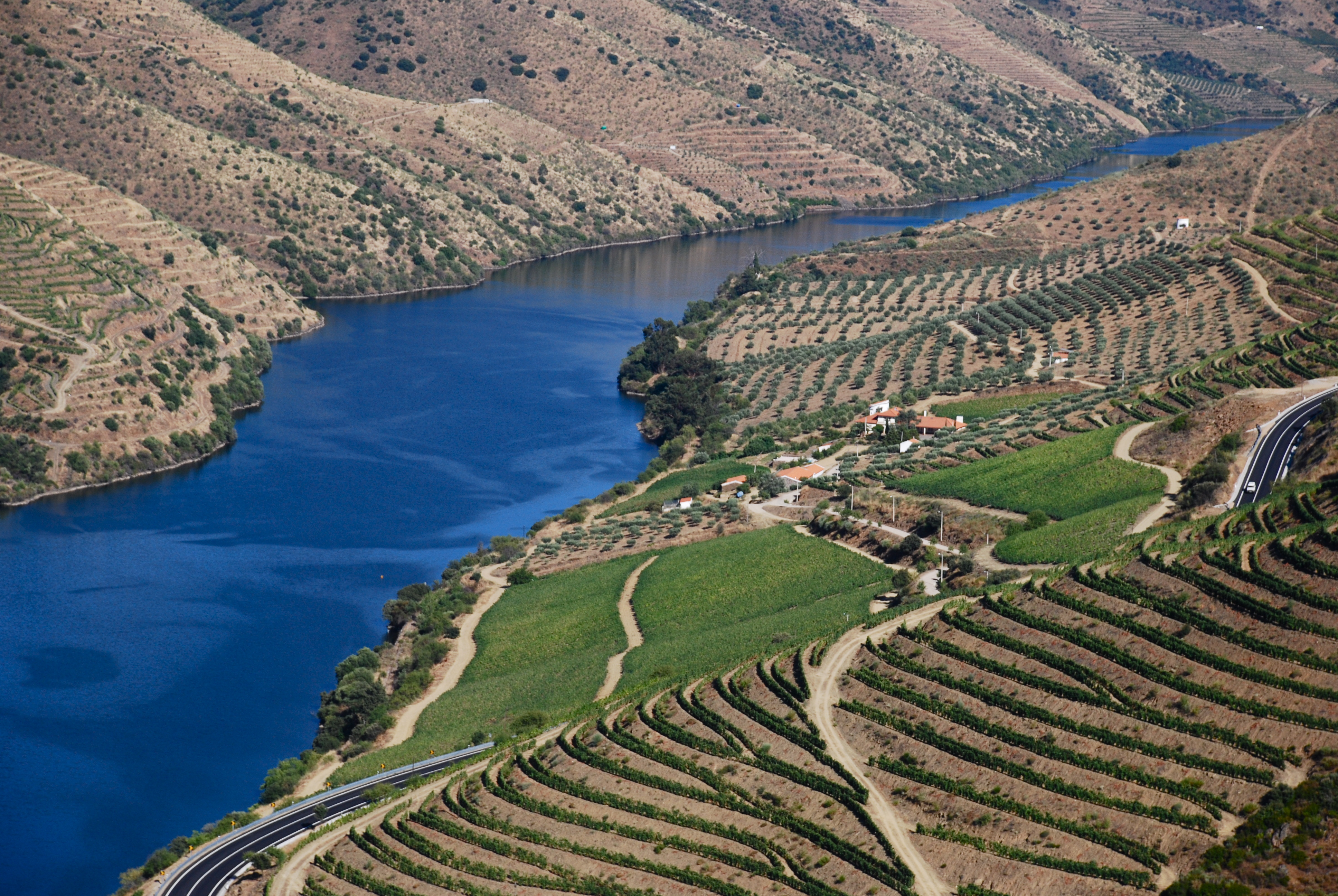 Douro (do Museu do Côa) 2